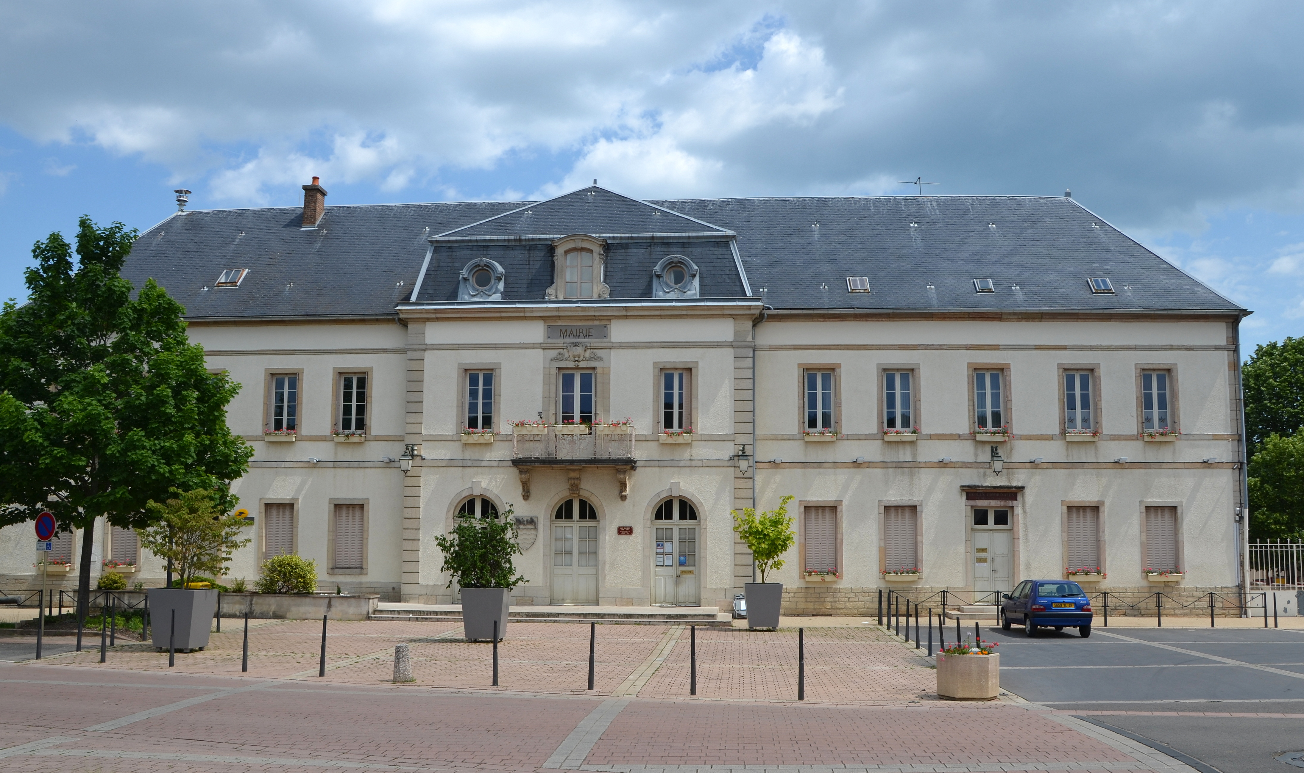 Mairie de Marsannay la Cote, Côte d'Or, Bourgogne, France